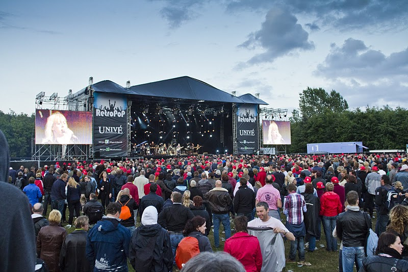 Retropop muziekfestival Emmen